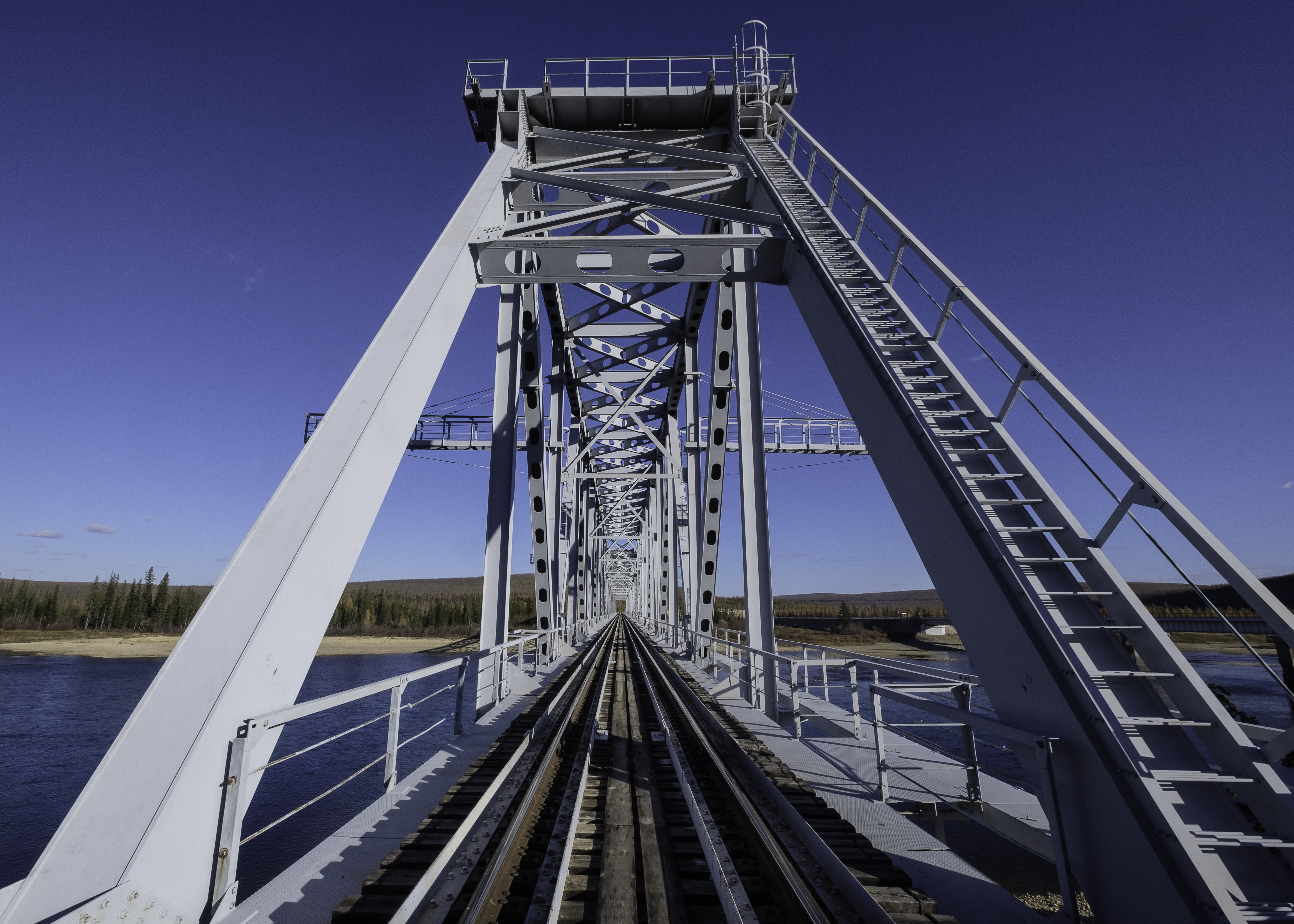 Spoorbrug over de Amga bij Verchnjaja Amga. Onderdeel van de Spoorlijn Amoer-Jakoetsk.